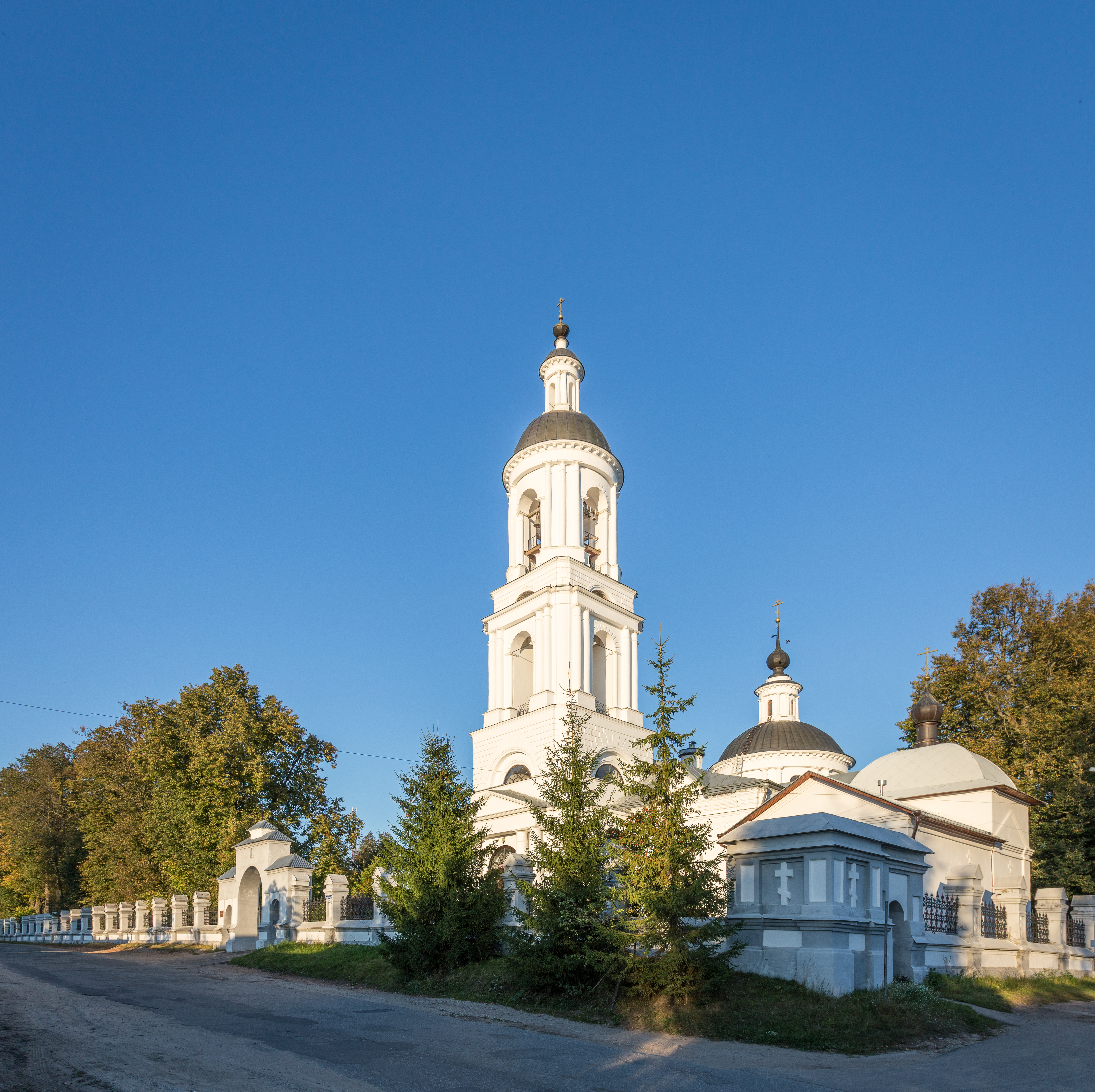 Церковь святителя Николая: Филипповское, Киржачский район, Владимирская область